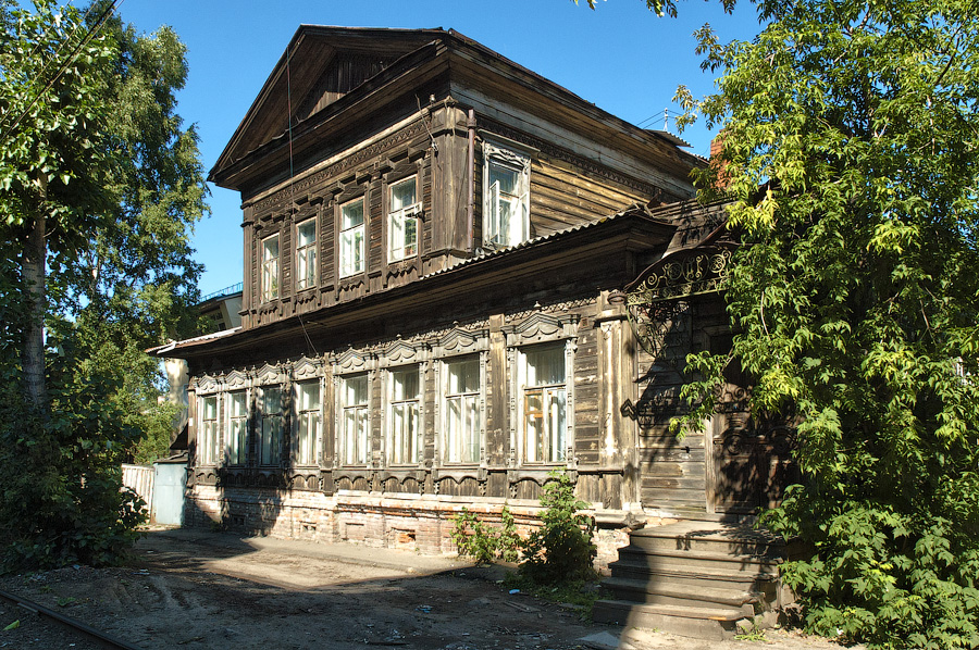 Жилой дом (одноэтажный) (Томская область, Томск, советская улица, 34)